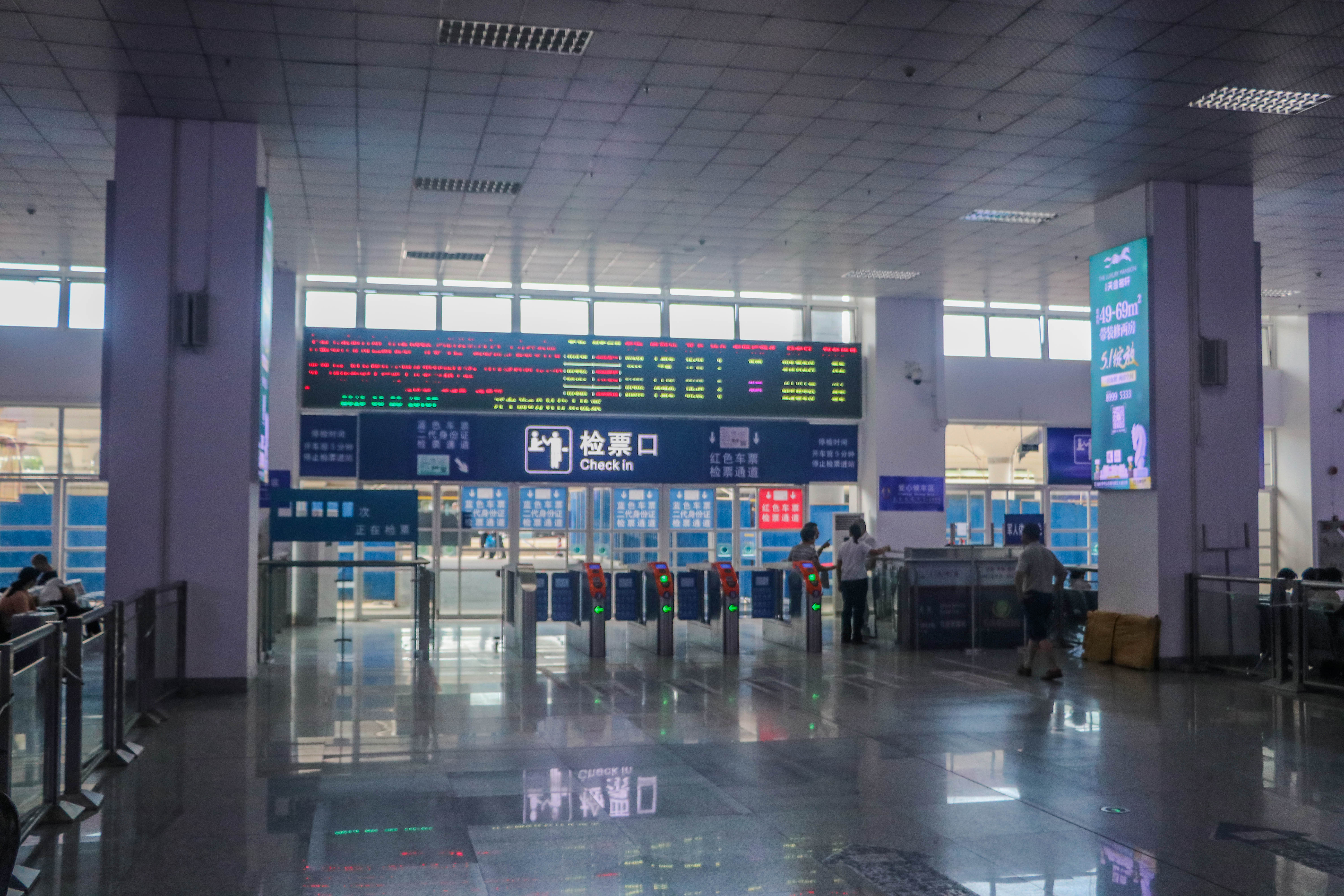 汕头站检票口